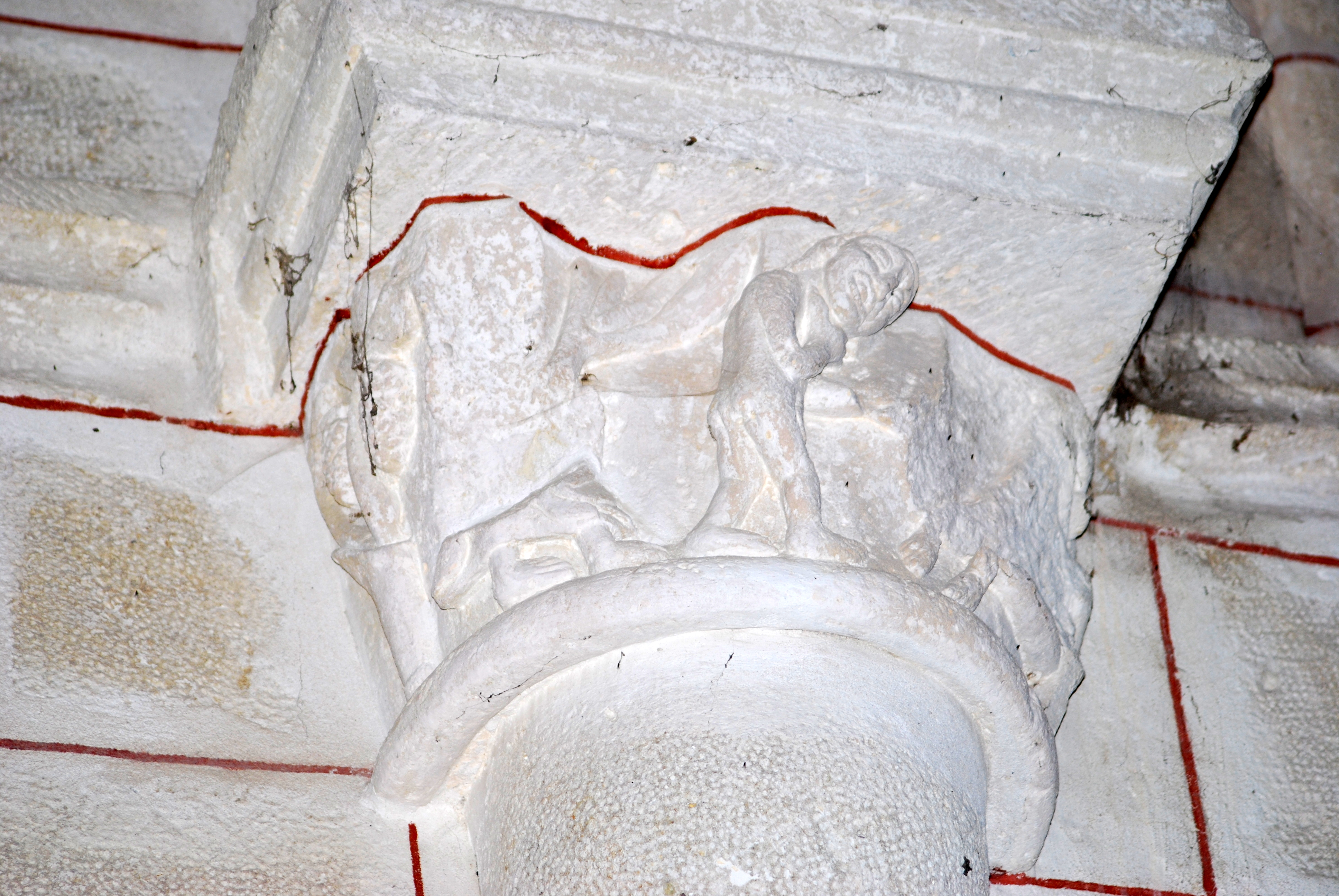 Église Notre-Dame de Doulezon